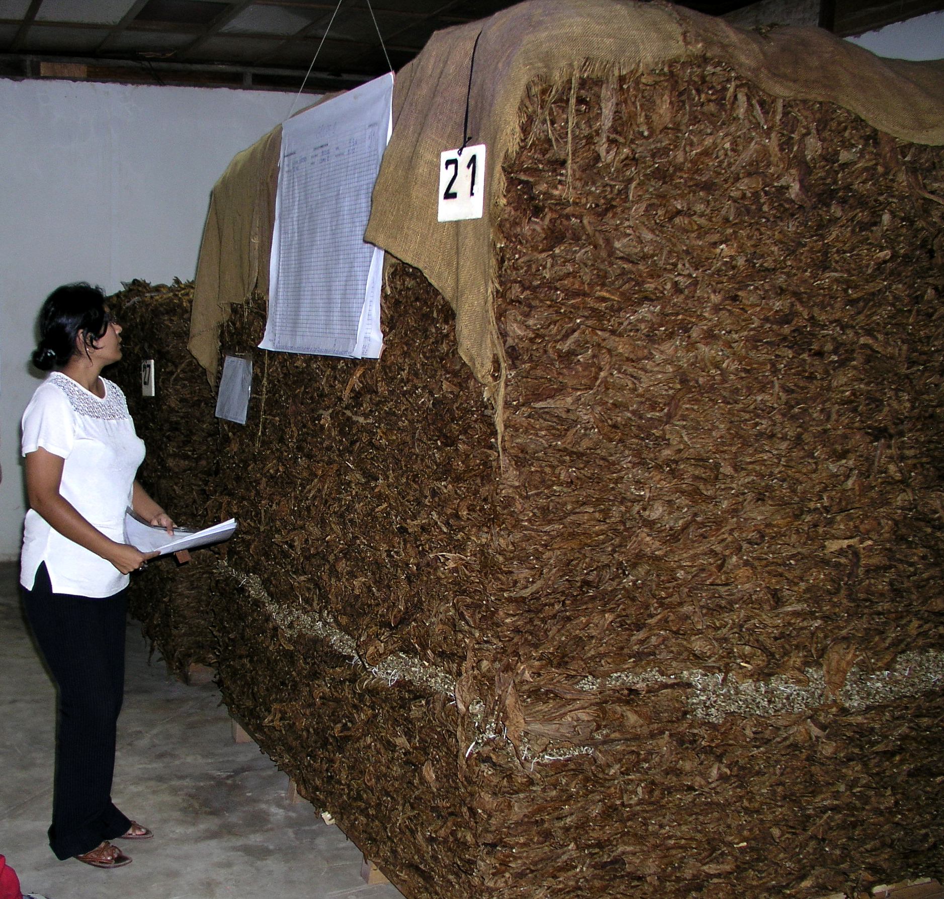 Tabacalera del Oriente, Tarapoto, San Martin, Peru.